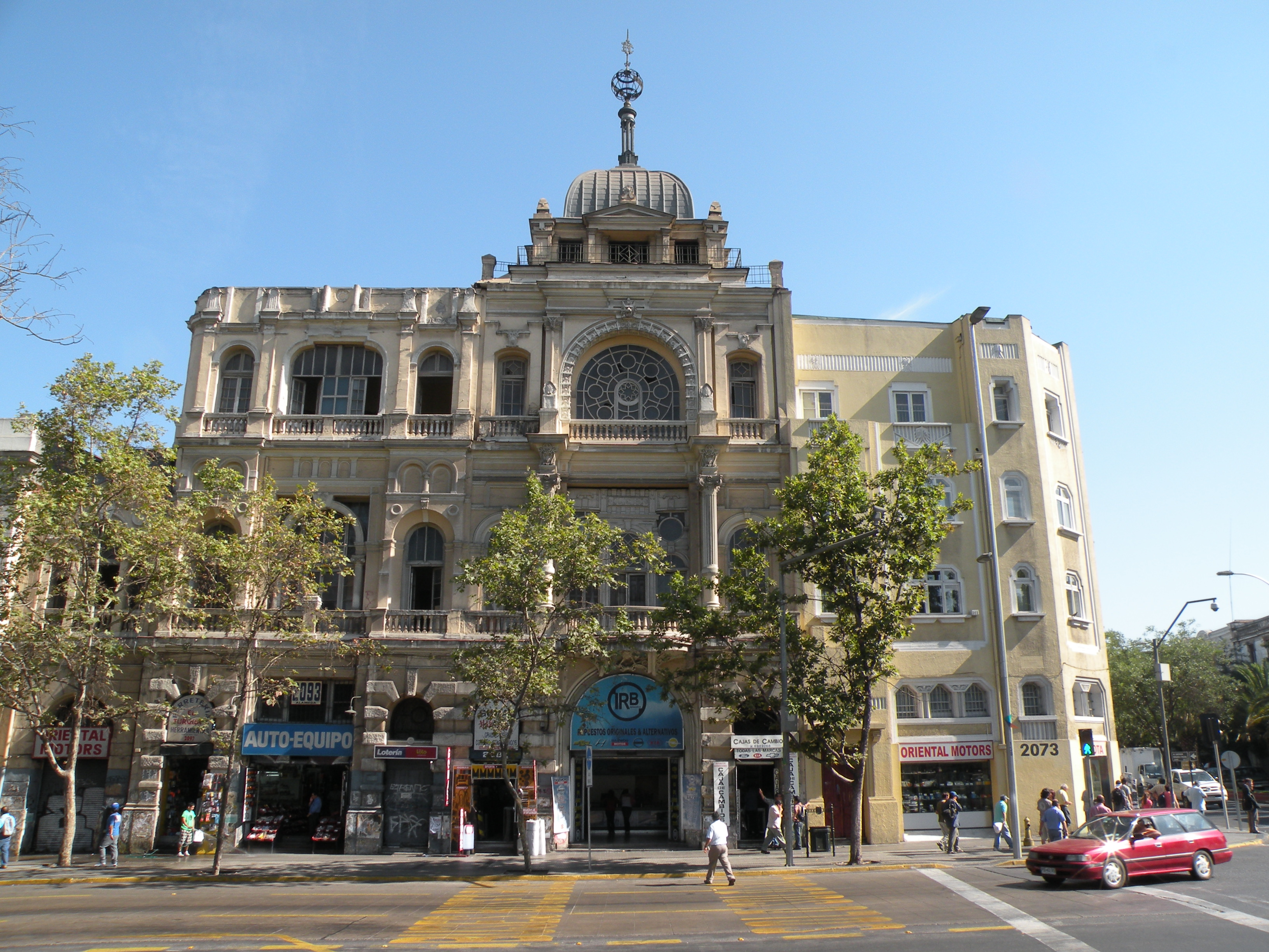 Palacio Elguín, ubicado en la interseccion de la Alameda, con la Av. Brasil.